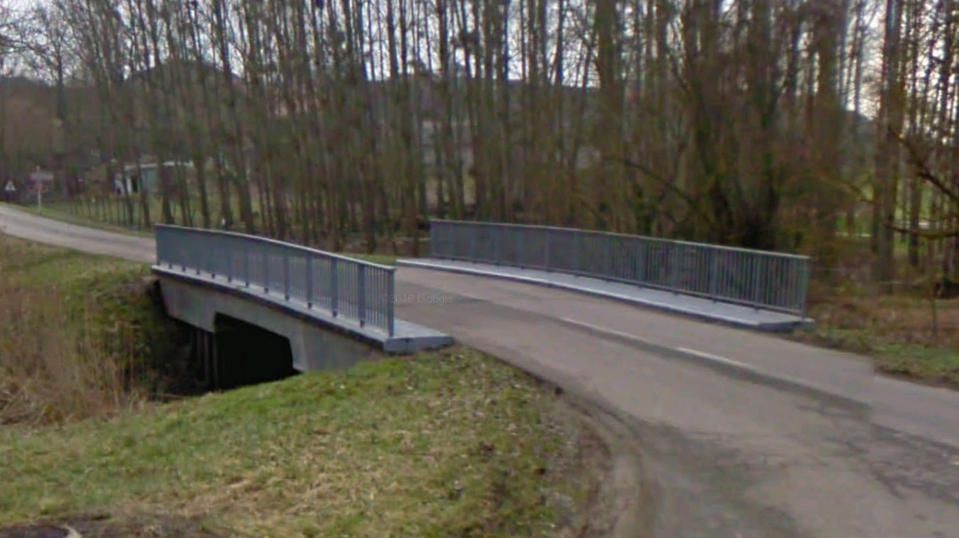 Pont enjambant le ruisseau de Palebœuf dans la commune de Vennezey en Meurtre-et-Moselle